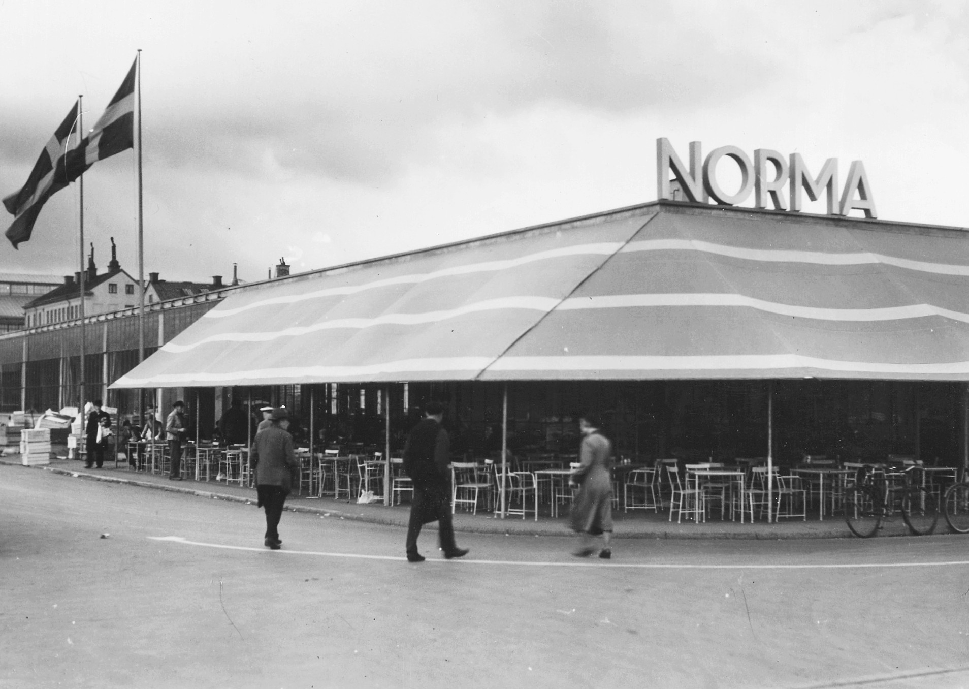 Klarahallen i Stockholm, arkitekt Hakon Ahlberg